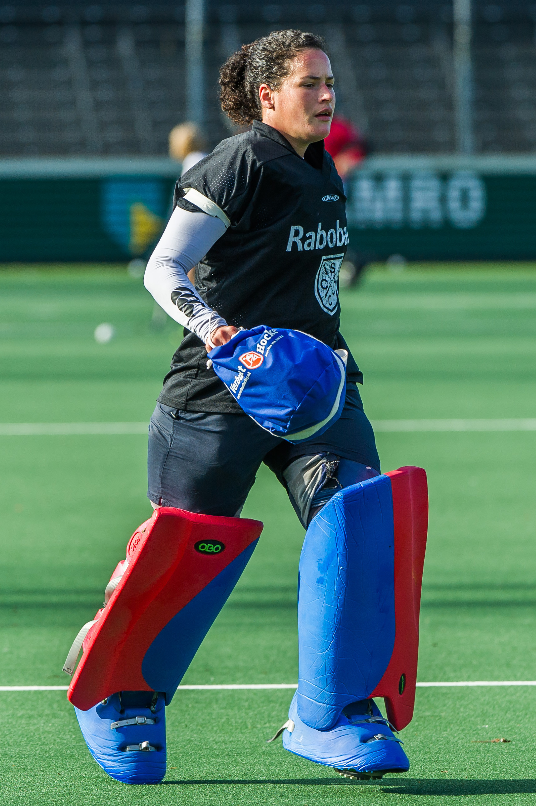 Inge Vermeulen, doelverdedigster van SCHC, tijdens de hockey Hoofdklasse wedstrijd AHBC - SCHC op 2-11-2014